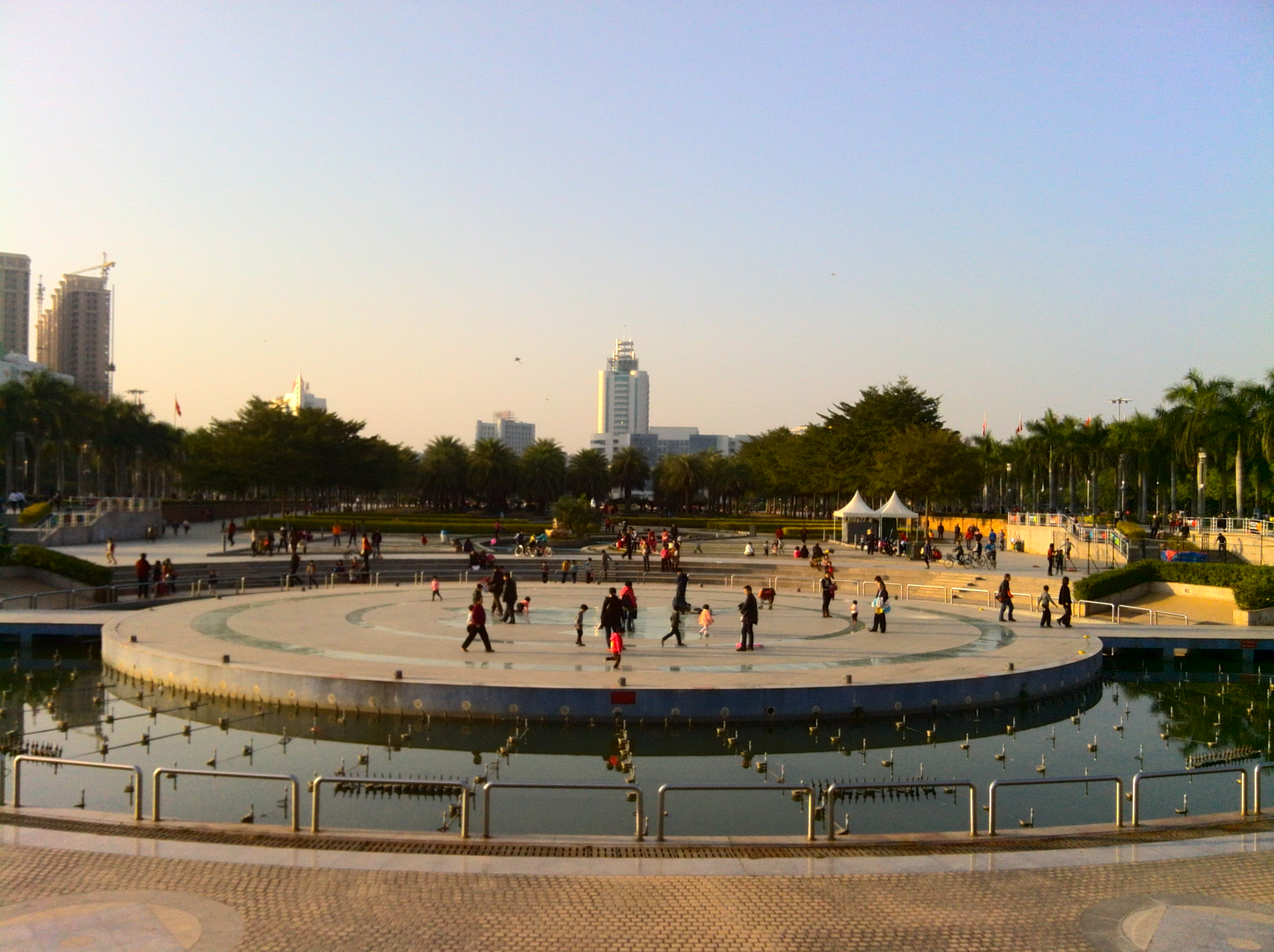 潮州人民广场下沉广场